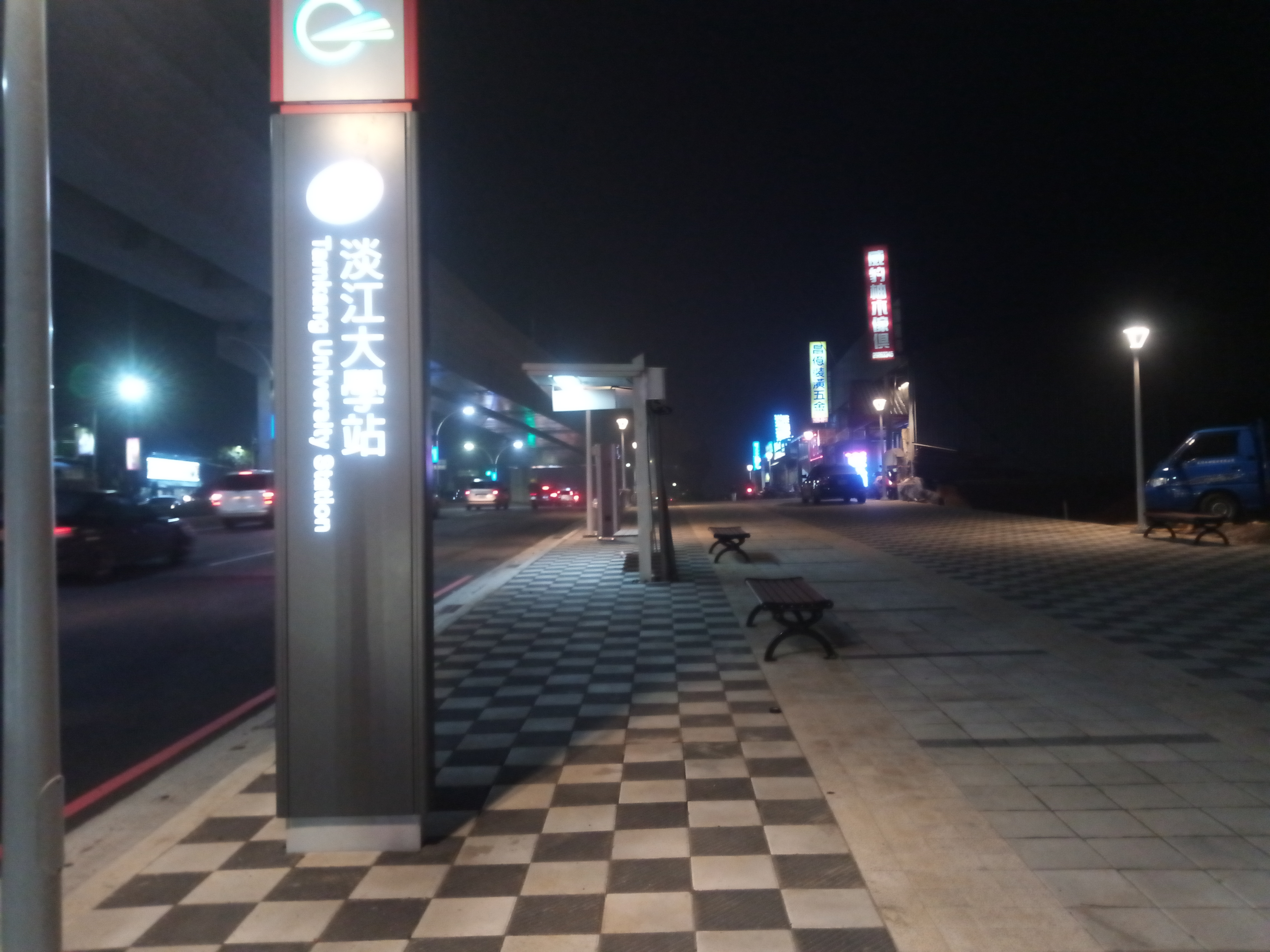 淡海輕軌淡江大學站出口人行道與公車候車亭夜景。